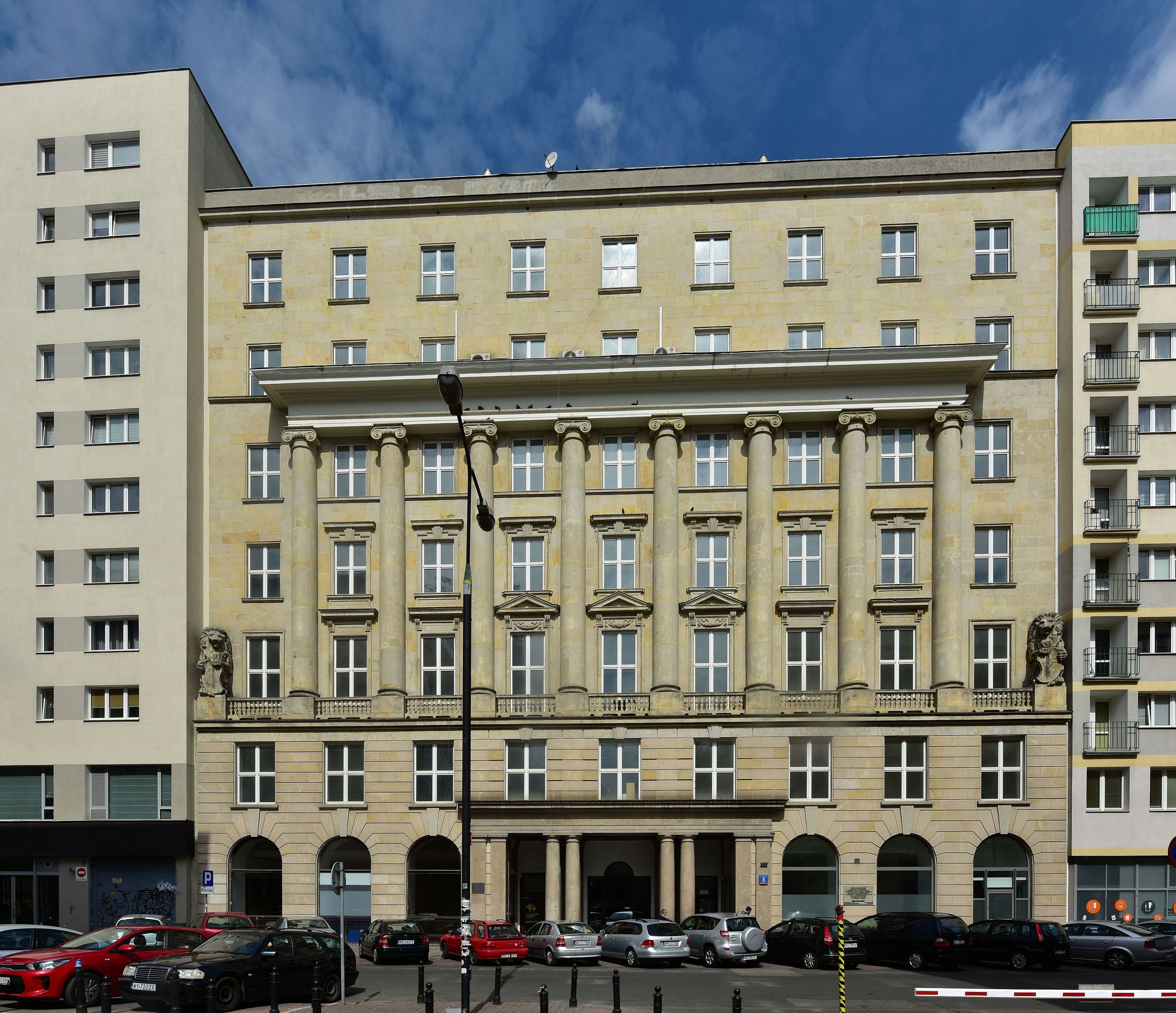 Budynek przy ul. Moniuszki 8 w Warszawie, dawna siedziba restauracji Adria